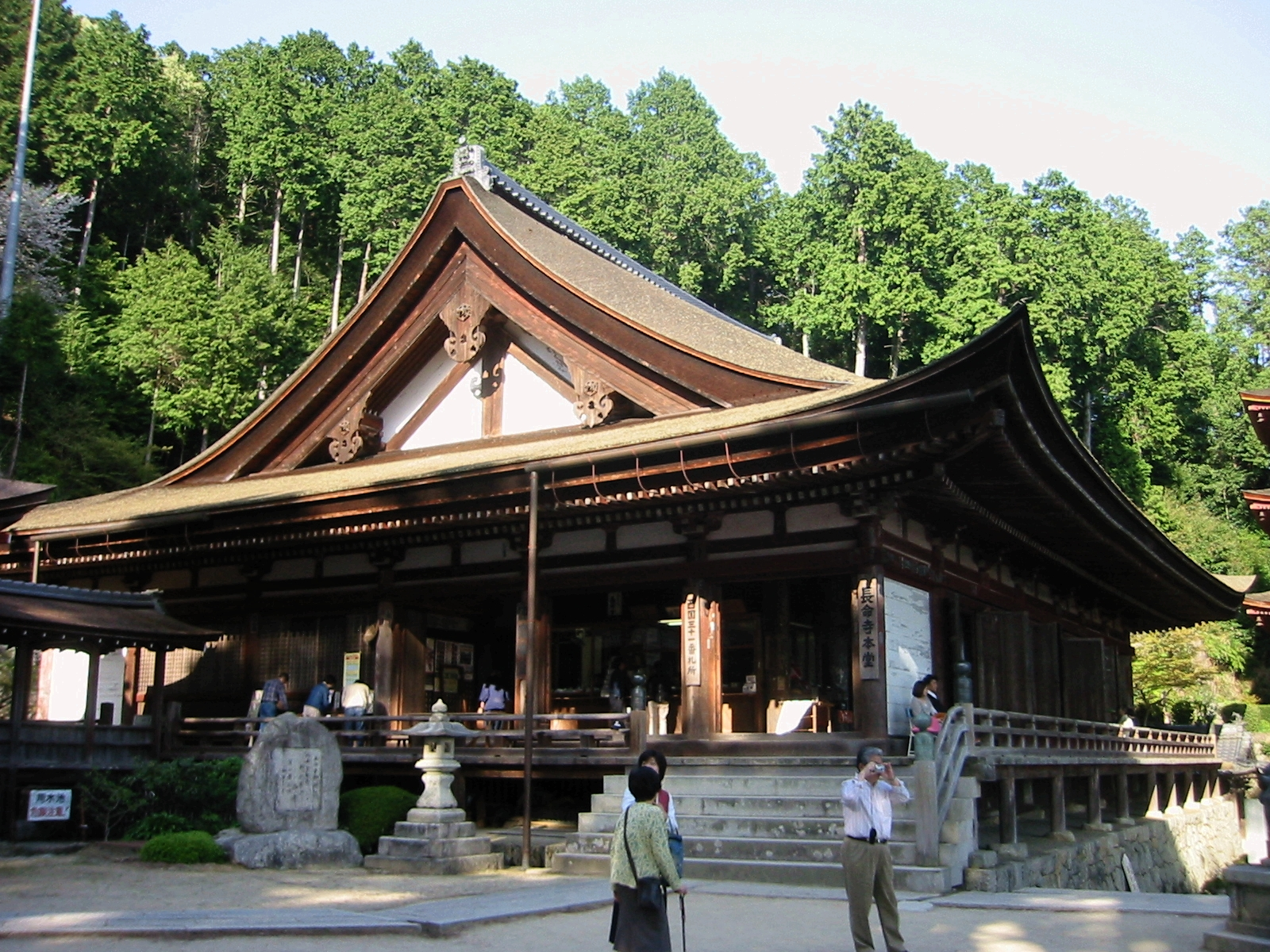 姨綺耶山長命寺